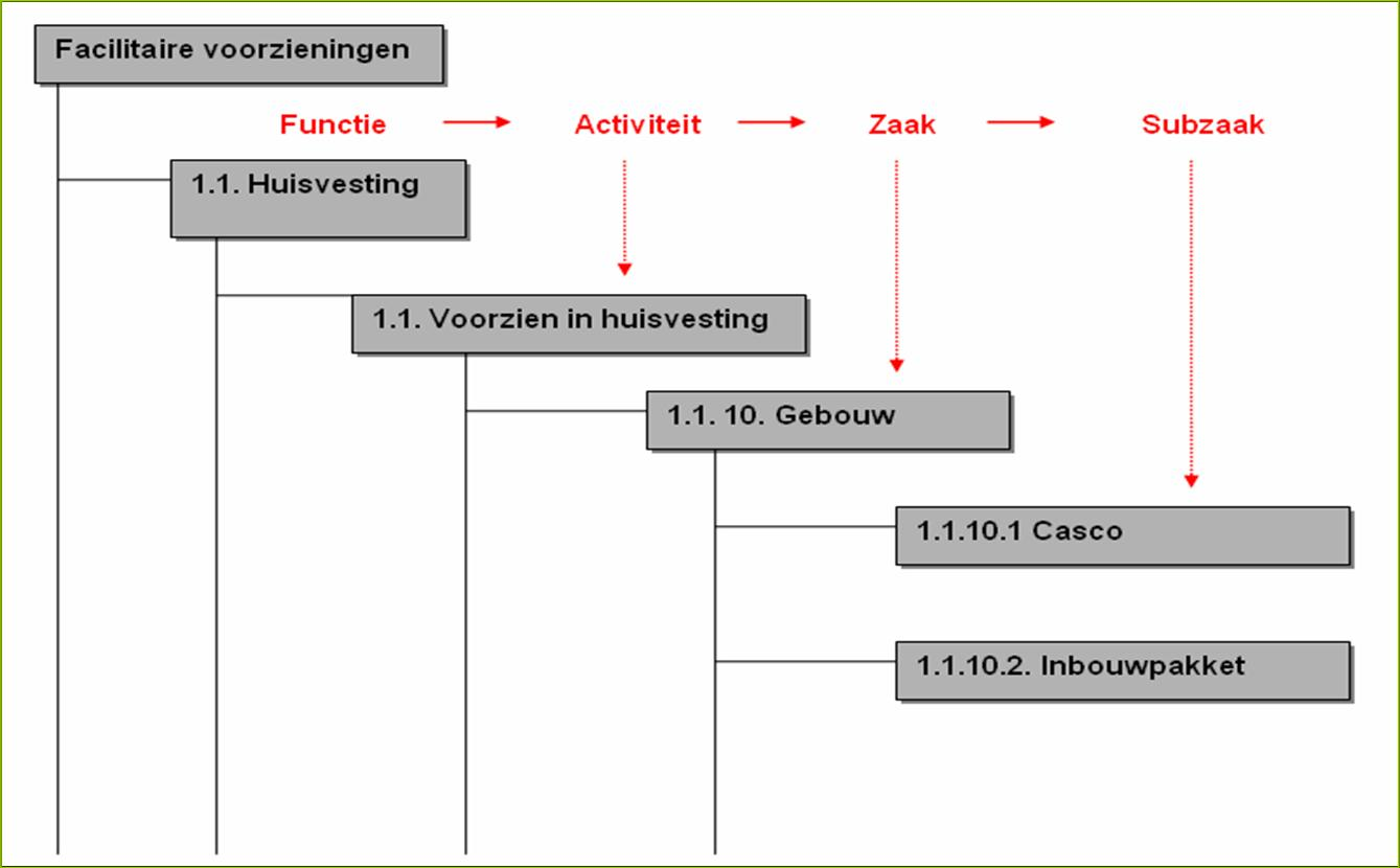 Eigen maak